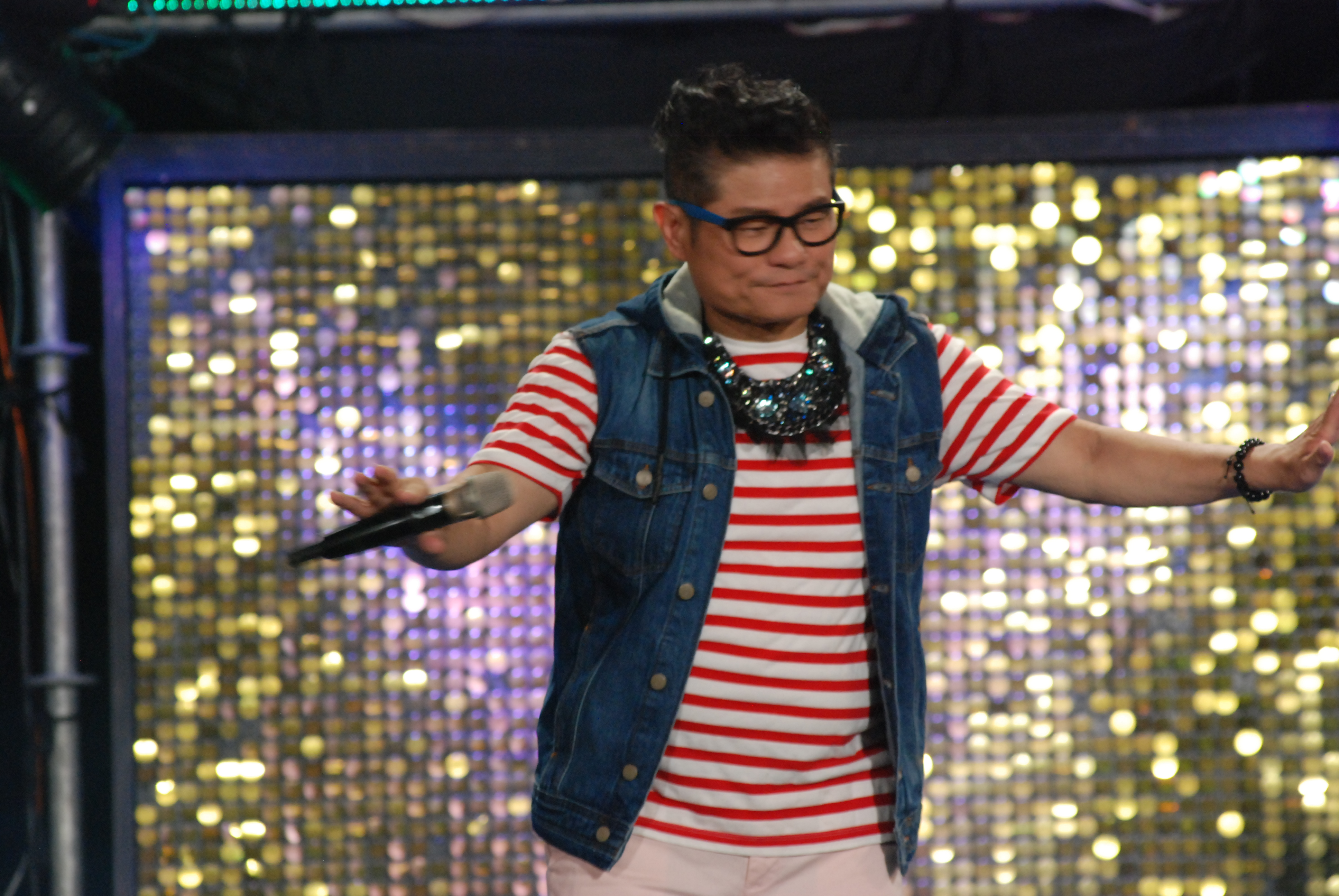 許效舜主持三立電視綜藝節目《超級夜總會》。